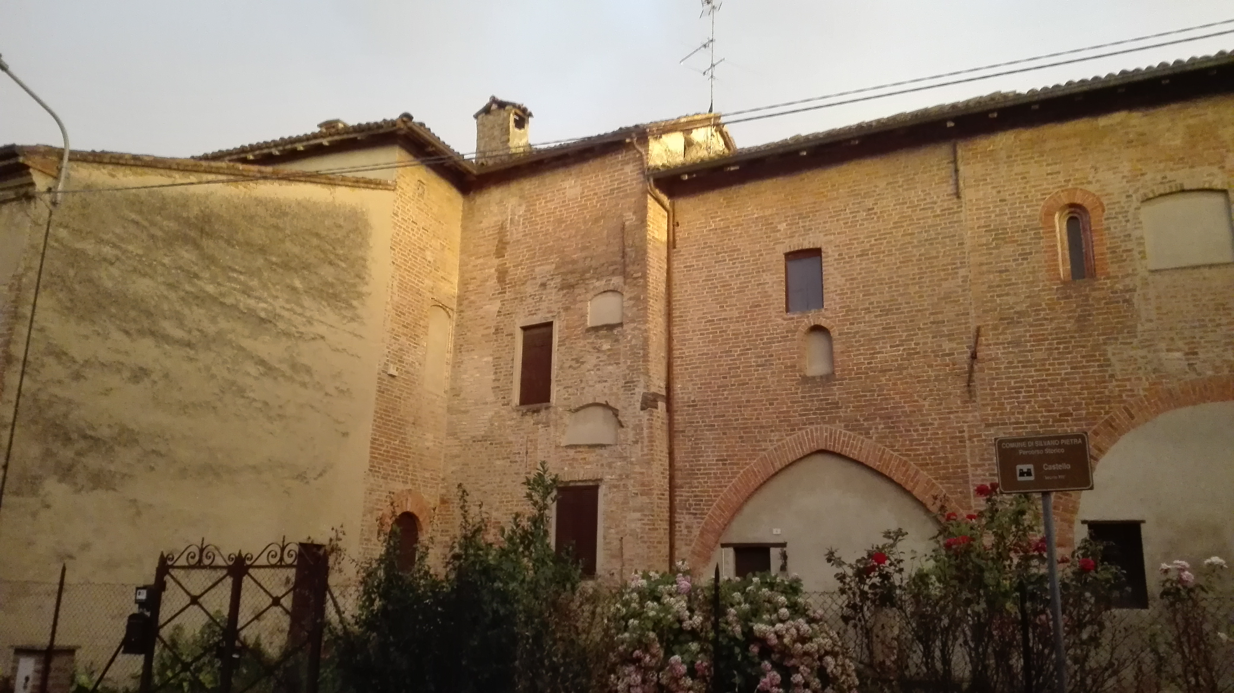 Veduta del Castello dei Conti Pietra